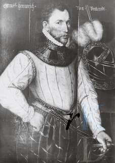 Hendrik van Brederode (1531-1568)